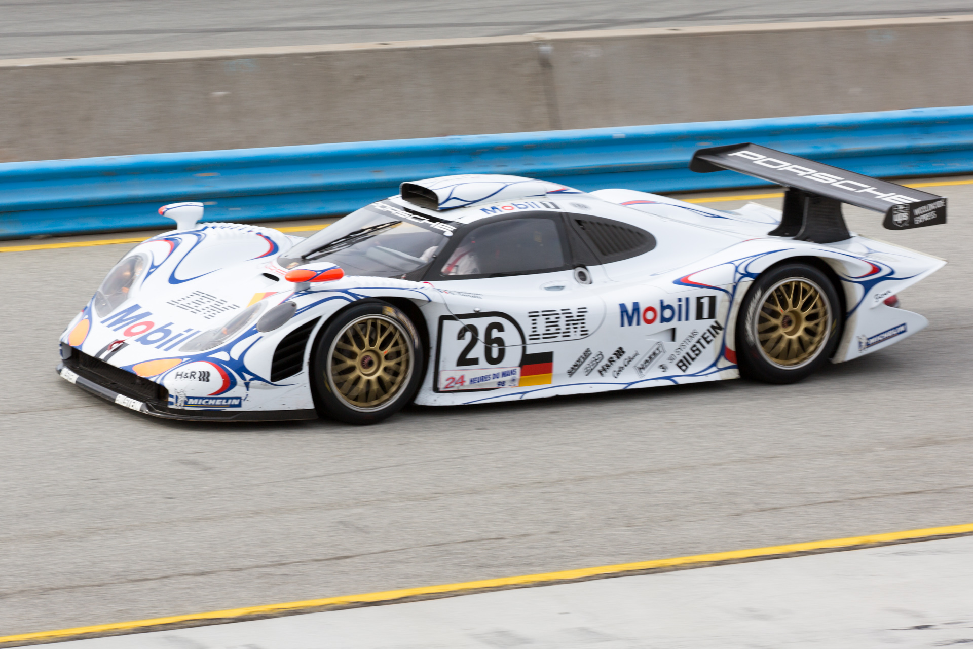 Rennsport Reunion V